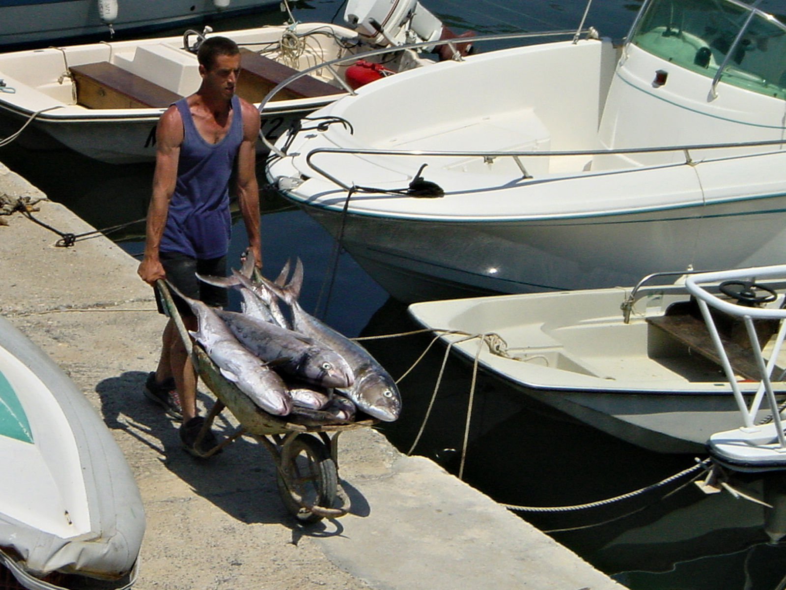 Centuri (Corsica) - Débarquement de poissons